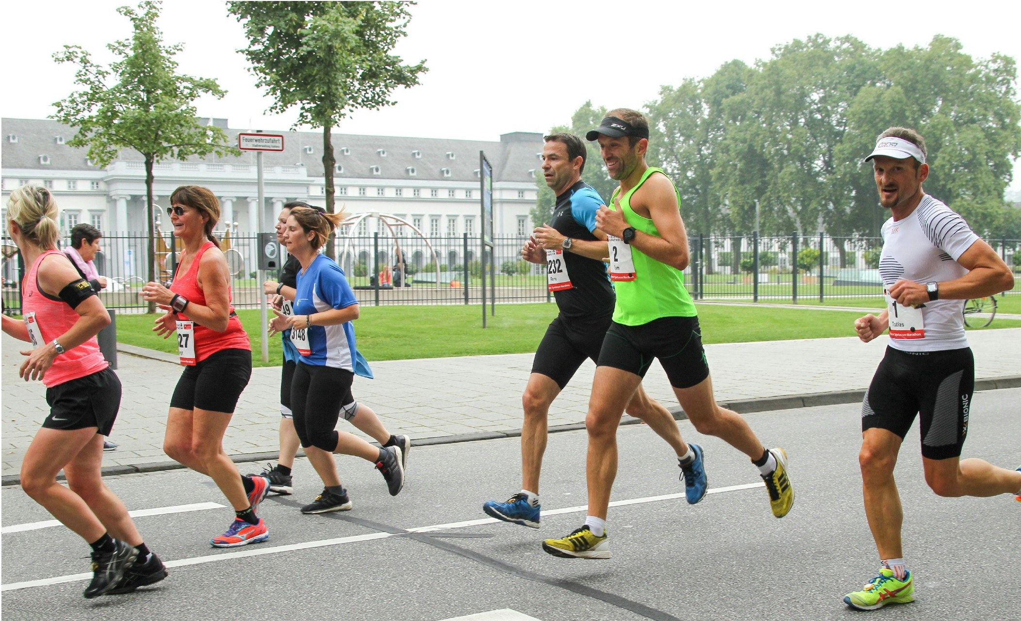 Koblenz Marathon 2017